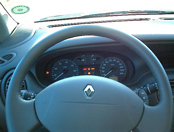 Renault Scenic 1.9dci RXE Baujahr 2001 Gekauft mit 4 km Verkauft mit 149.900km nach 6 Jahren